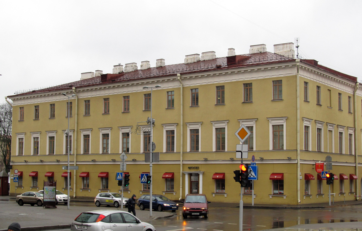 Мінск. Вуліца Інтэрнацыянальная, 19